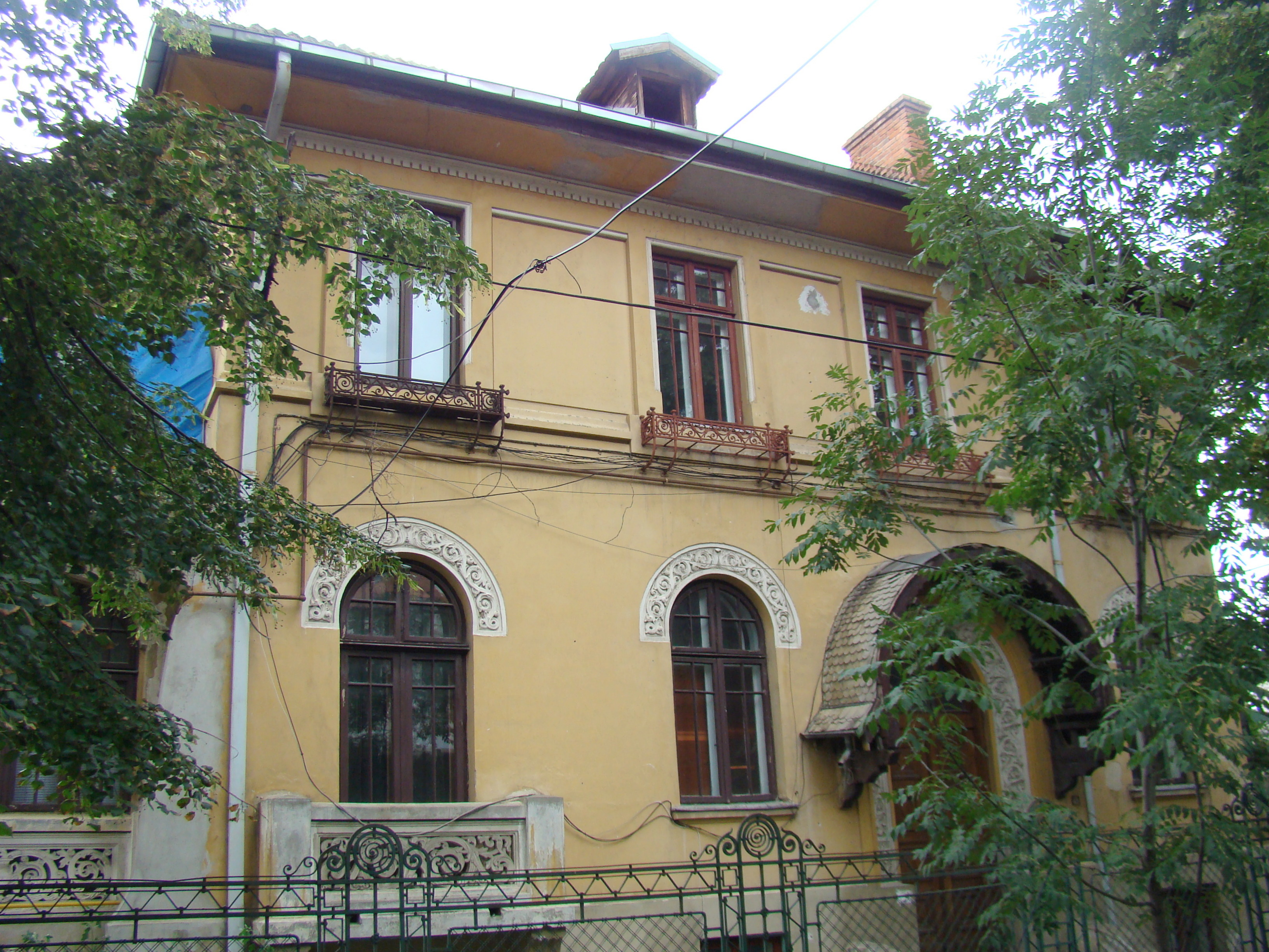 Casă monument istoric, str.Londra, nr.49